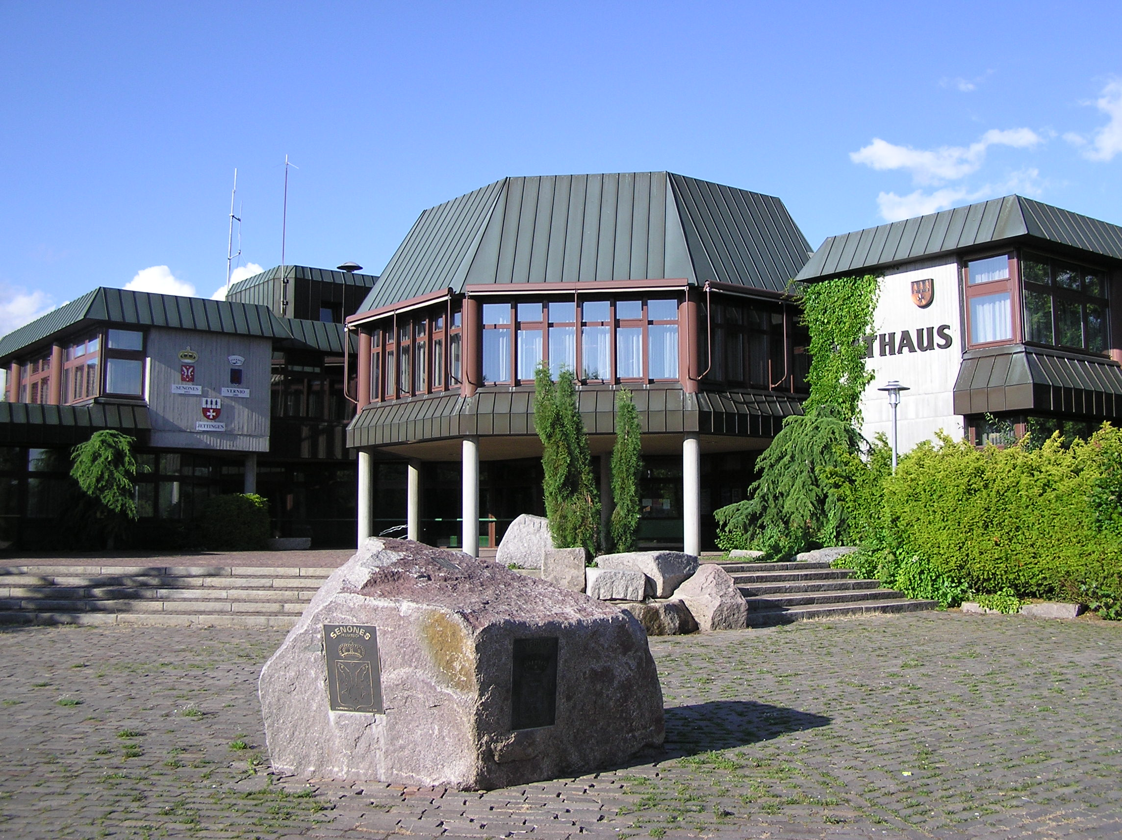 Jettinger Rathaus